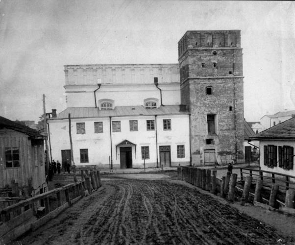 Большая синагога в Луцке.